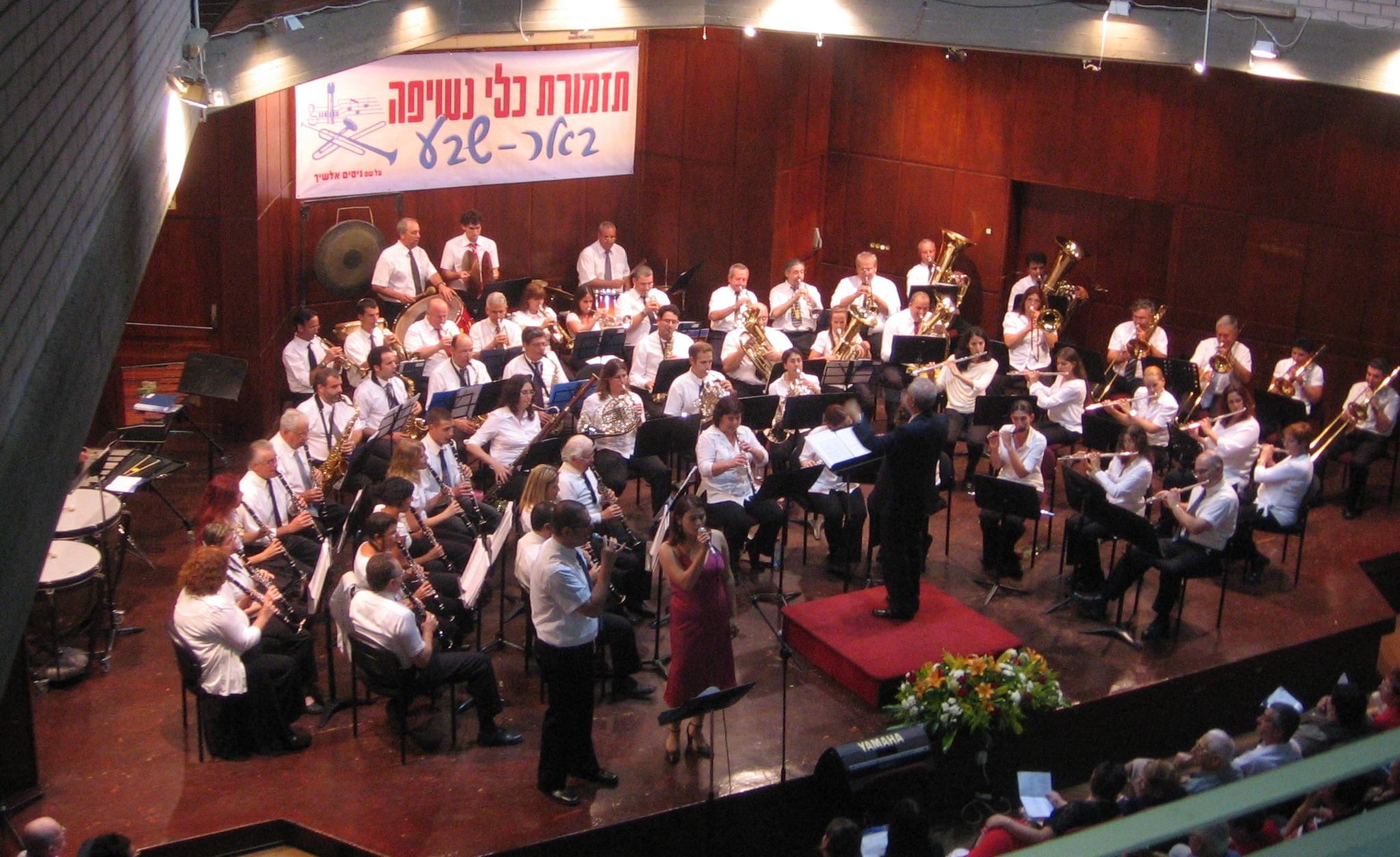 תזמורת כלי הנשיפה באר שבע - 2008